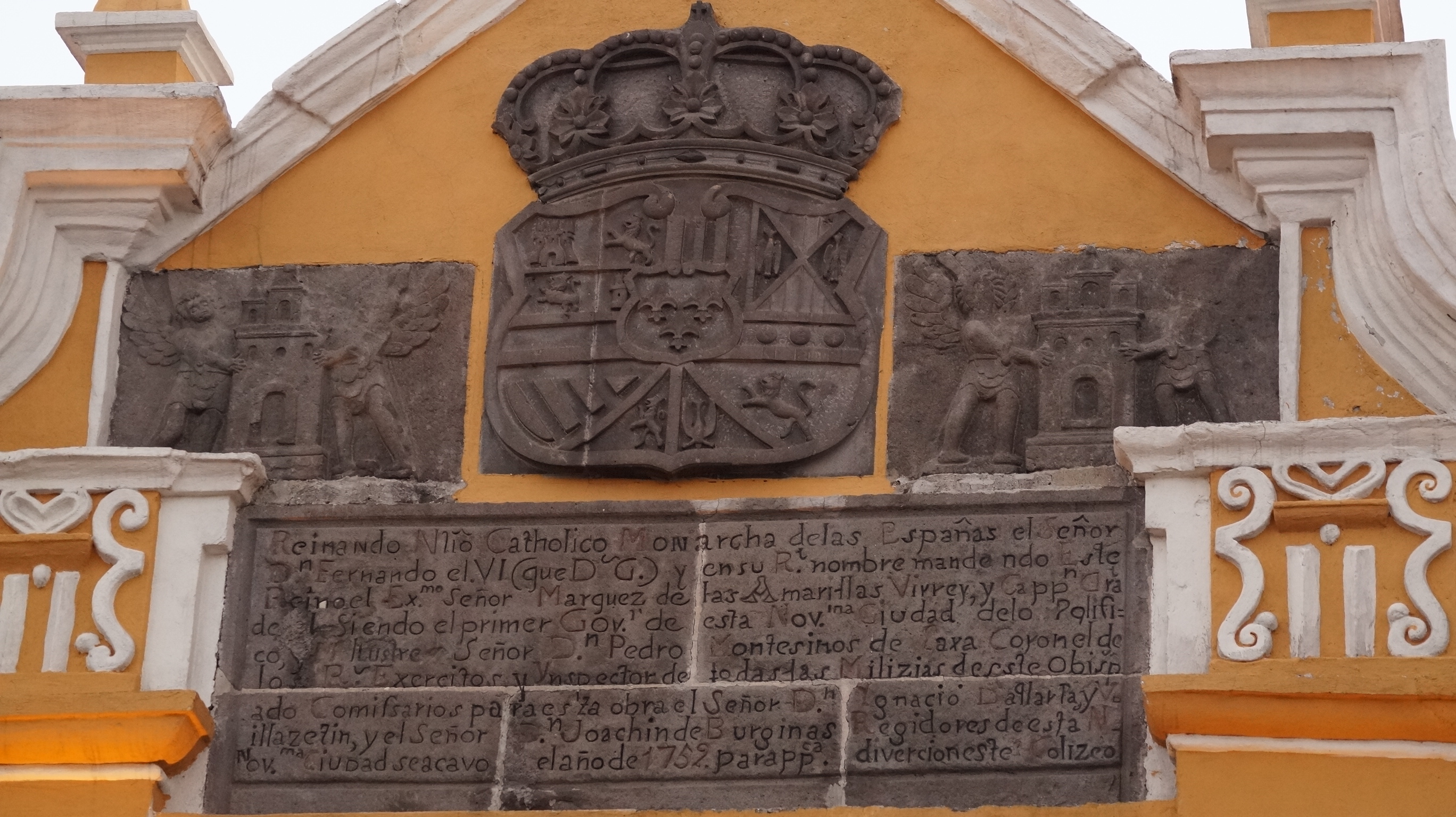 Escudo y leyenda del Teatro Principal de la ciudad de Puebla, en Puebla, México.